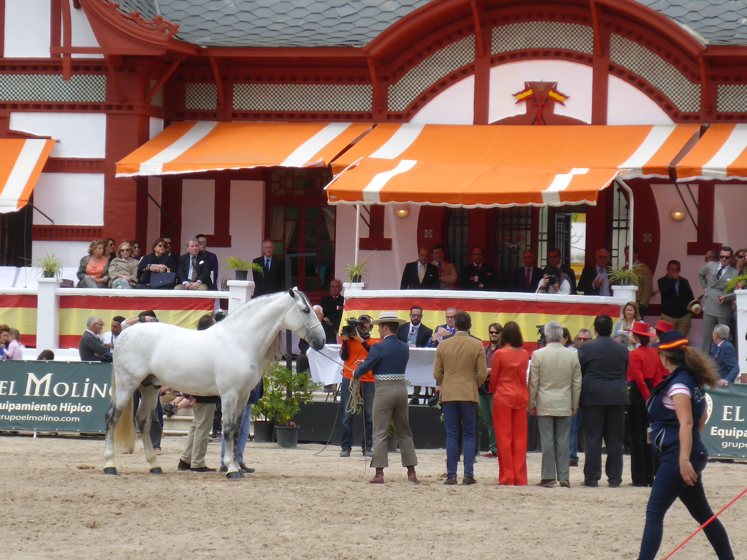 Entrega de galardón al Campeón de Campeones Equisur 2016 en la Feria del Caballo.